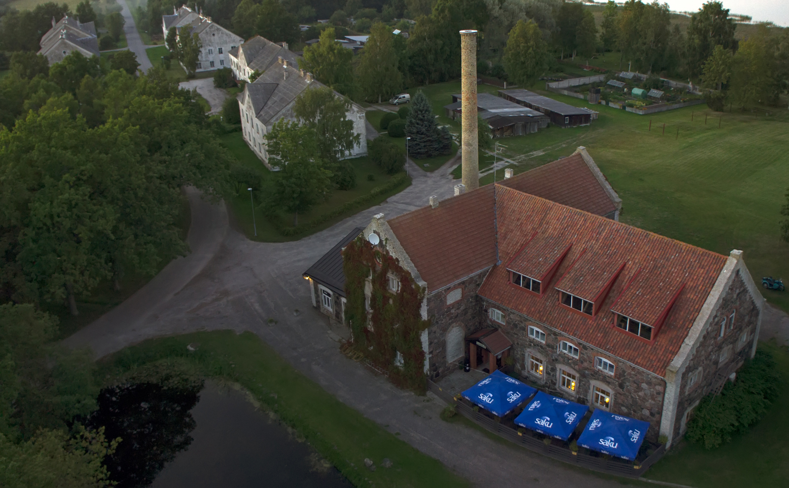 Kõrgessaare mõisa viinavabrik